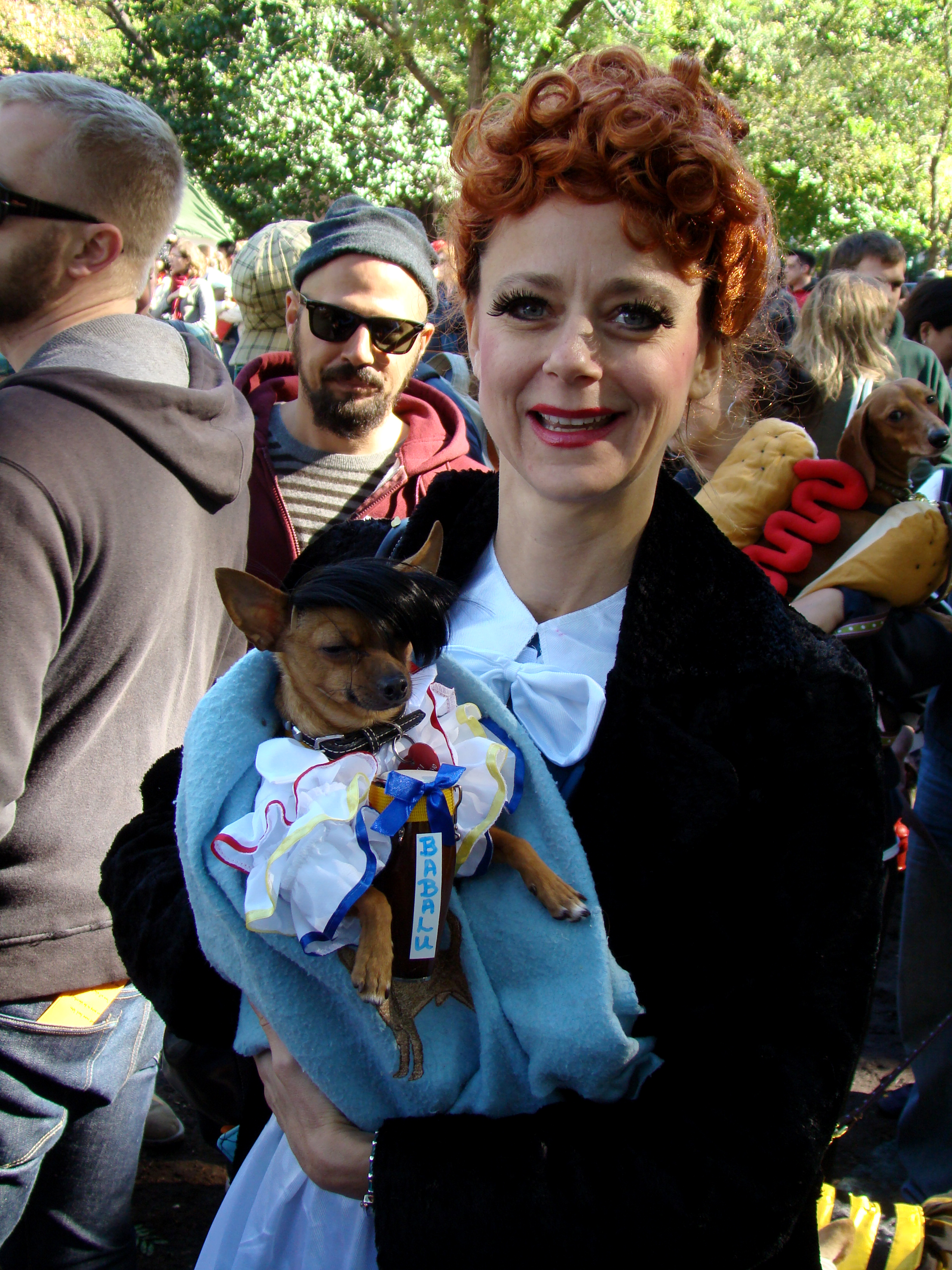 combover